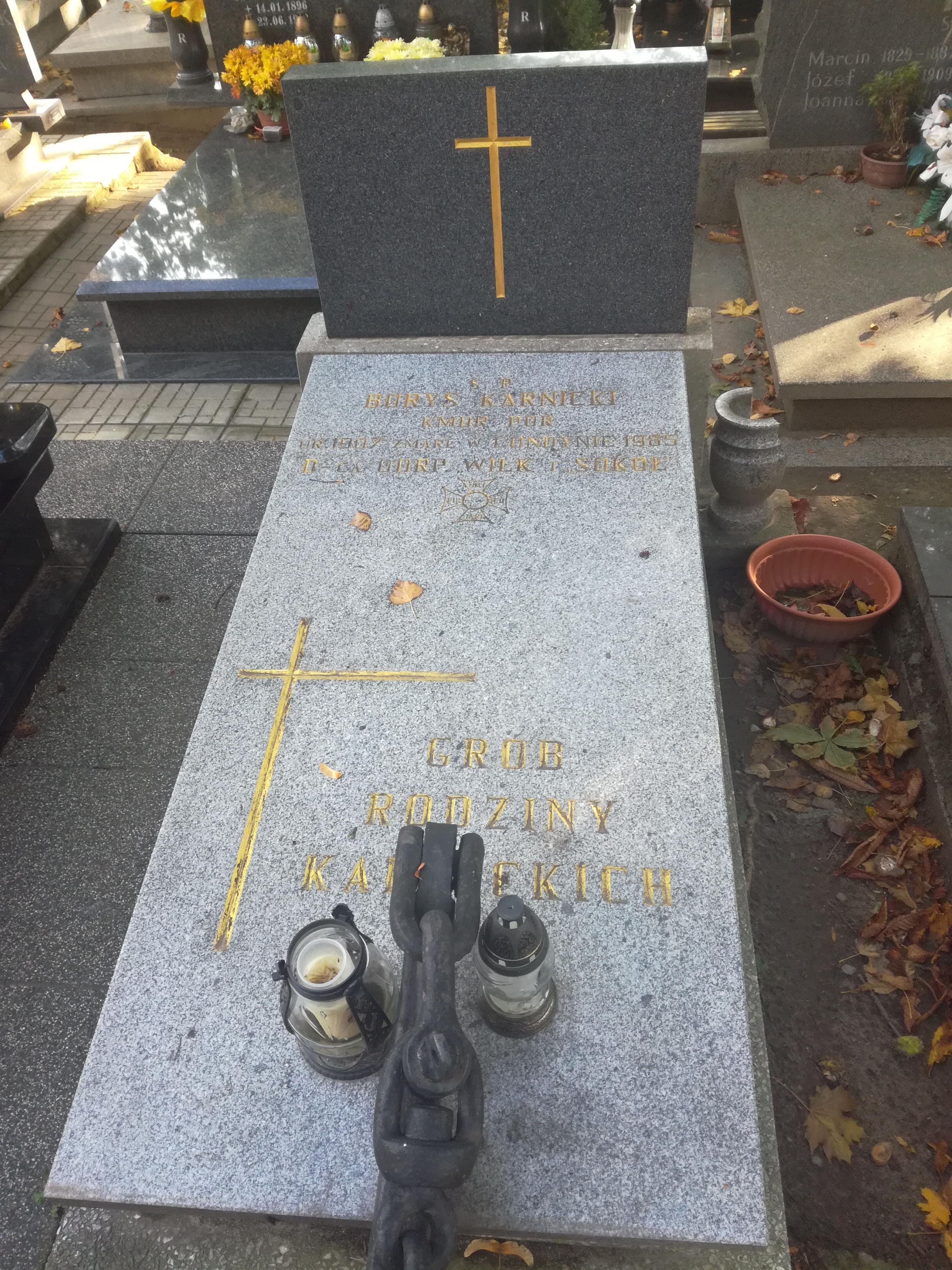 grób Borysa Karnickiego na cmentarzu prafialnym w Gdyni-Oksywiu